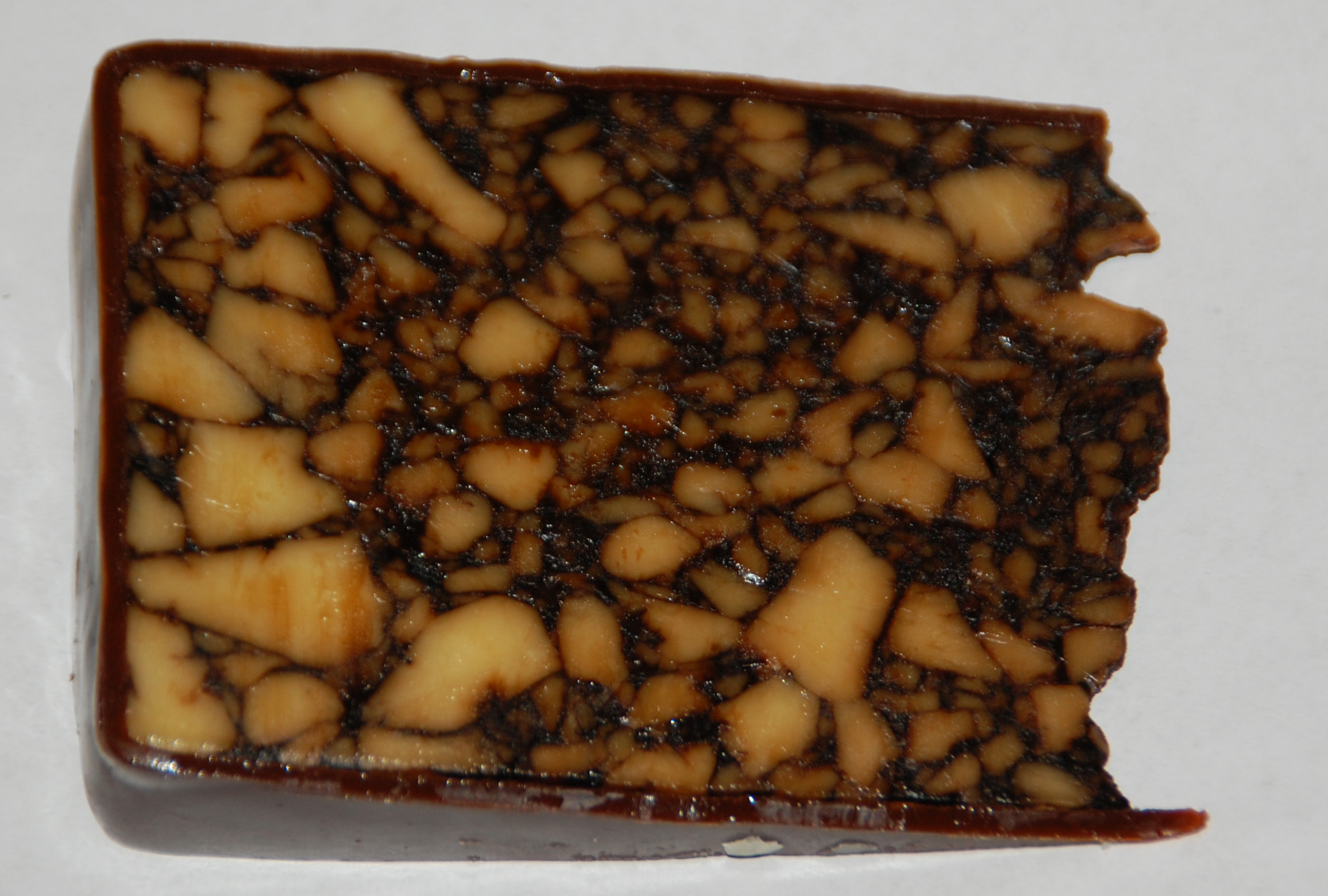 Cahill’s Irish Porter Cheddar, eingebettet in eine Masse aus Porterbier